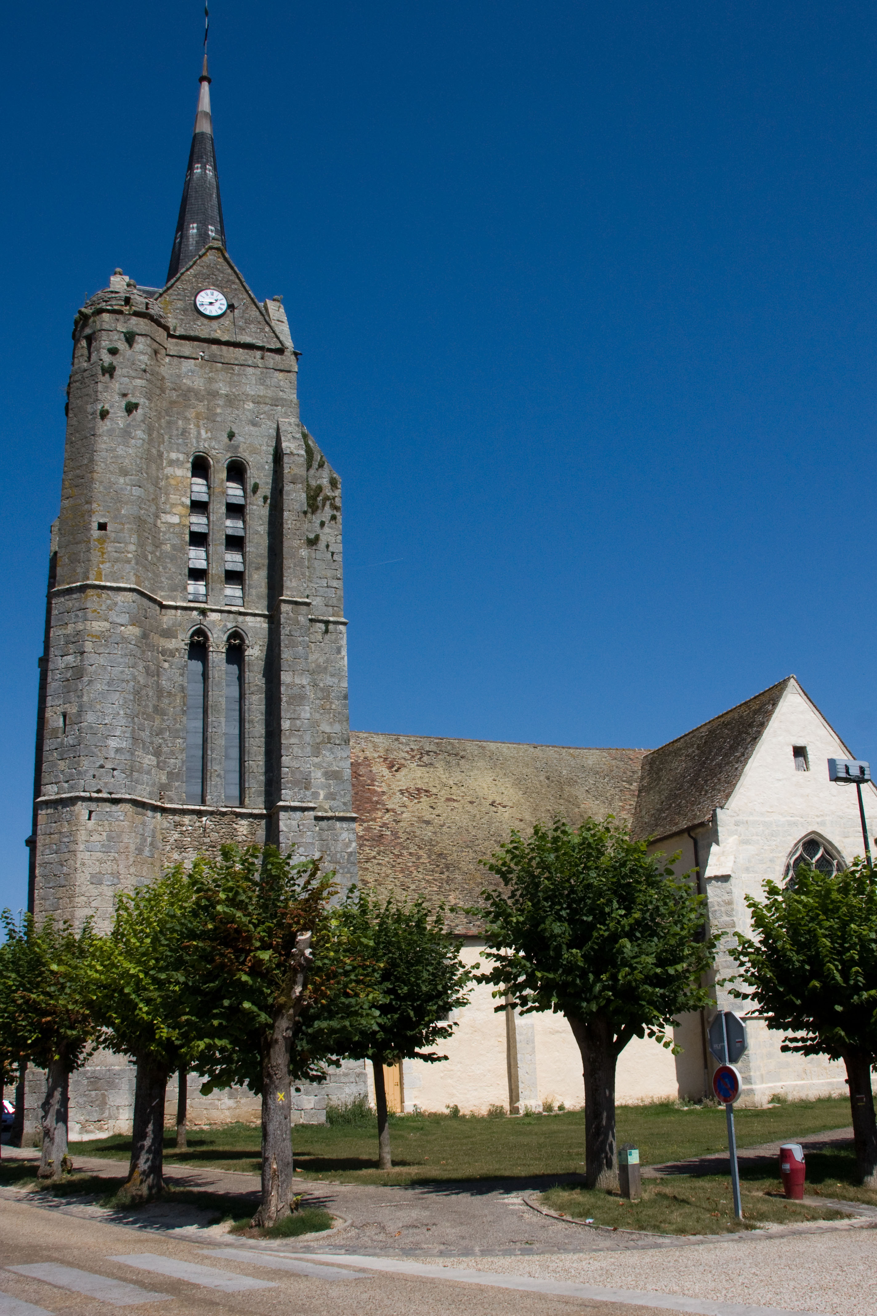 Eglise de Moigny-sur-École, Moigny-sur-École, Essonne, France